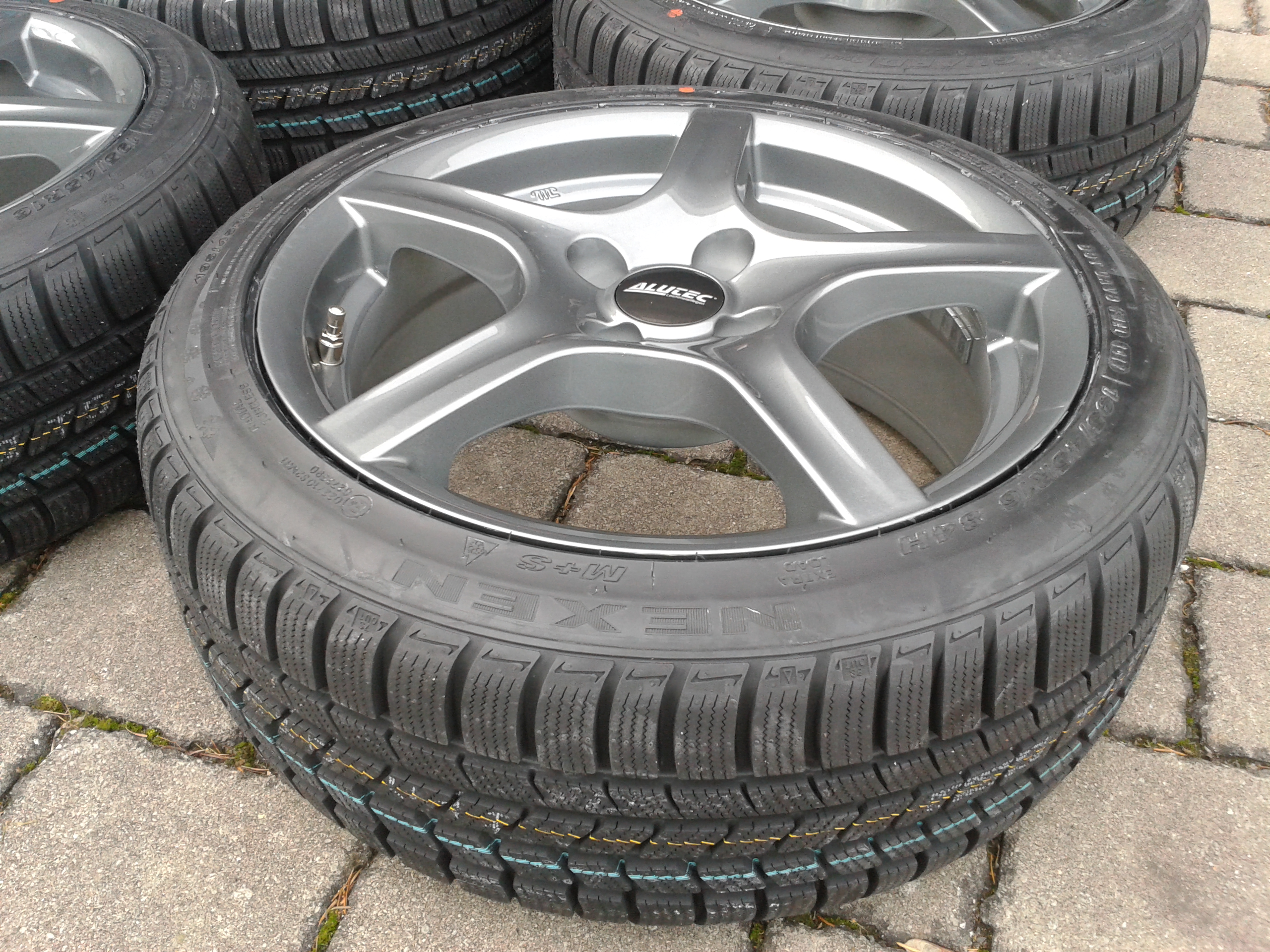 Nexen WinGuard Wintertire and Alutec Rim